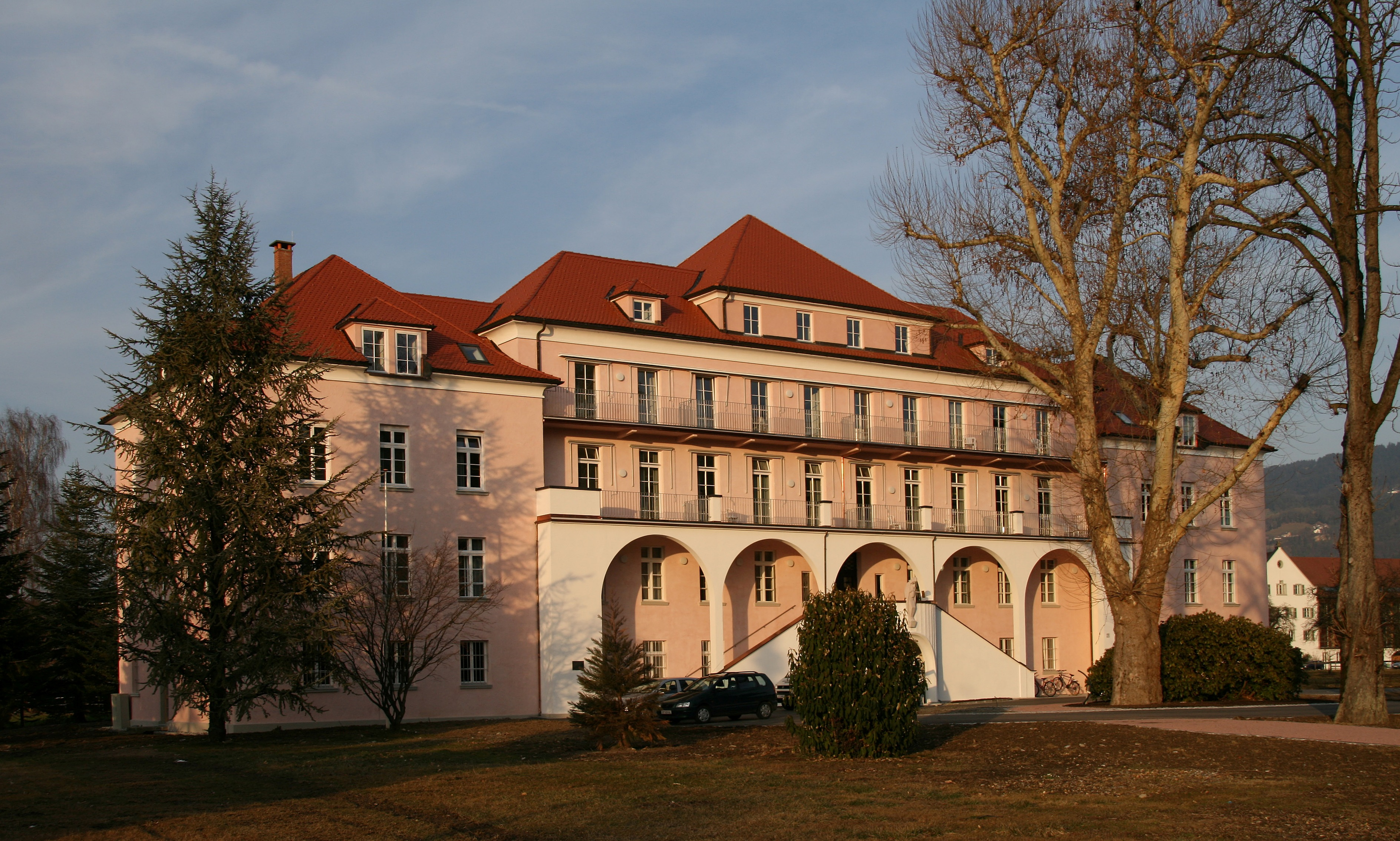 aus dem DEHIO Vorarlberg 1983: Mehrerauer Strasse Nr. 72: "Sanatorium Mehrerau", erbaut von Clemens Holzmeister 1922/23. Abgestufte Walmdaächer, Laubenbalkone: Marienplastik von Albert Bechtold, 1923. *** Als die Zisterziensermönche von Wettingen 1854 die noch bestehenden Gebäude der alten Benediktinerabtei Mehrerau erwarben, gehörte das Obere Bad der Familie Josef und Robert Bilgeri. Neben der Bodenseefischerei betrieben sie das beliebte Gasthaus und Bad Mehrerau. Seinen Ruf verdankte das Bad Mehrerau zum einen der recht kräftigen Schwefelquelle, zum anderen aber den tüchtigen Badwirtsleuten Bilgeri. *** In Bregenz, Vorarlberg.